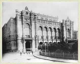 A pesti Vigadó képe a XIX. századból.